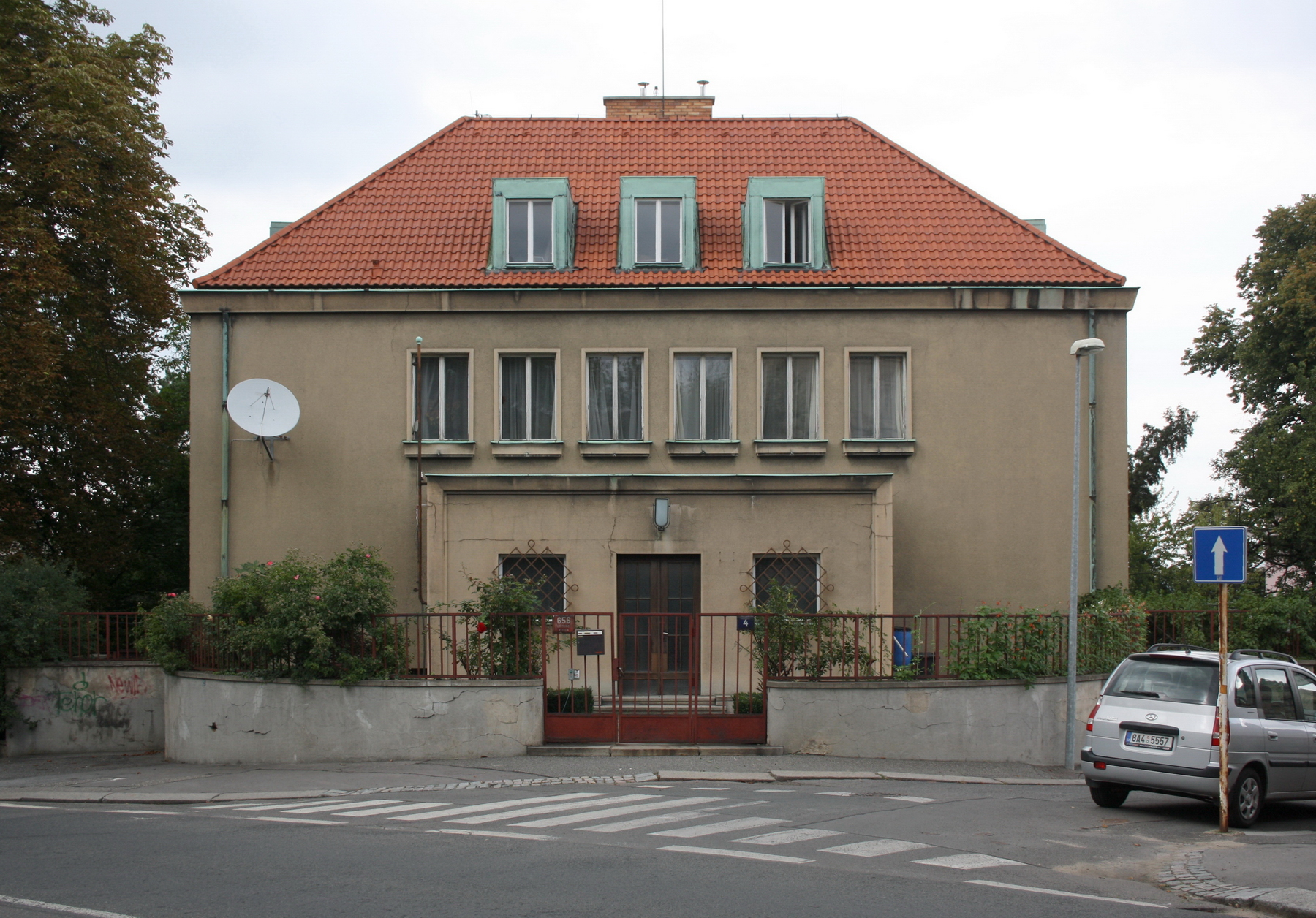 Bohumír Kozák: vlastní vila, Praha 6 - Střešovice, č.p. 656, Pevnostní 4